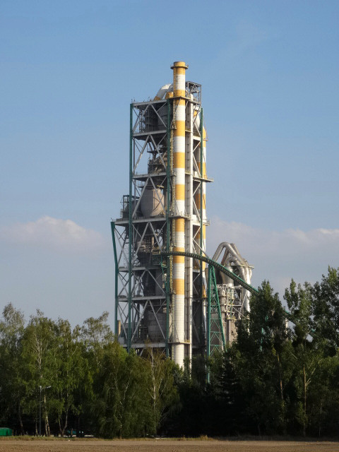 Cementownia Kujawy w Piechcinie k. Barcina, woj. kujawsko-pomorskie